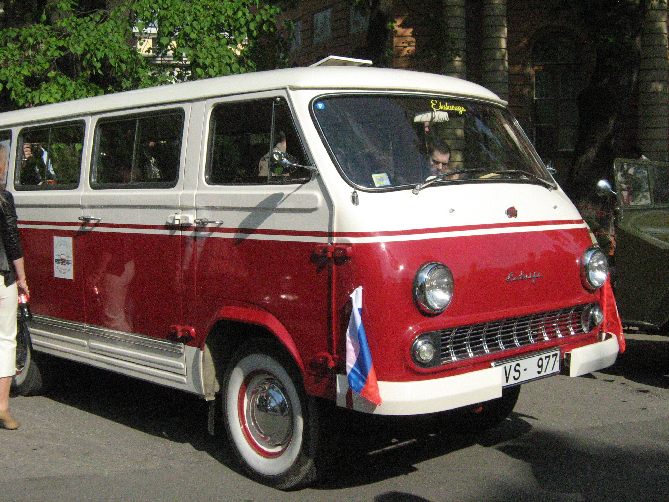 РАФ-977ДМ «Латвия» на II Петербургском параде ретро-транспорта 22 мая 2016 года